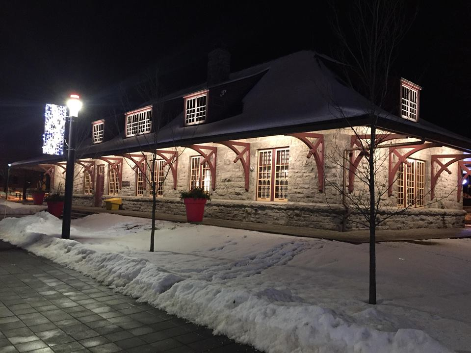 La vieille gare de Saint-Jérôme, un soir de novembre 2018.